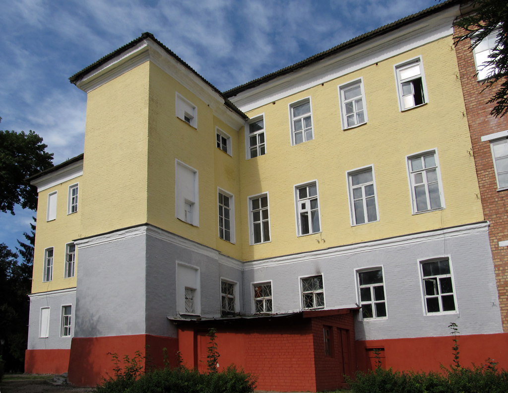 Горкі, Бульвар Ленінскі